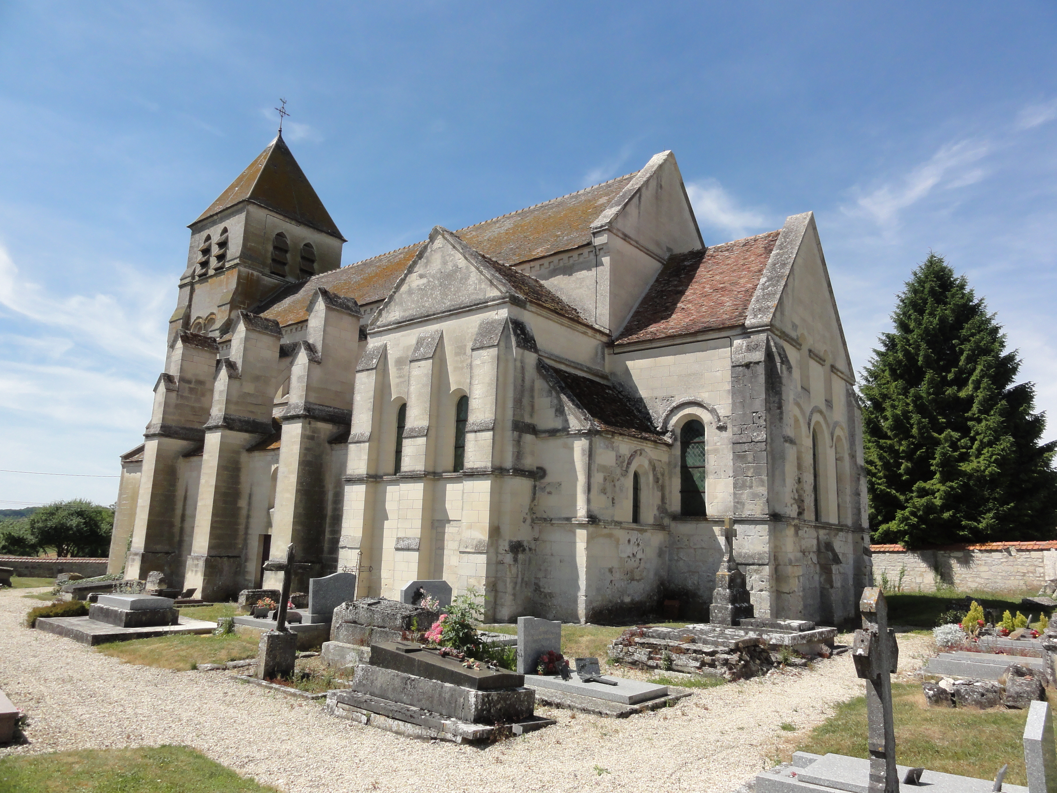 Colligis-Crandelain (Aisne) église Saint-Martin de Crandelain